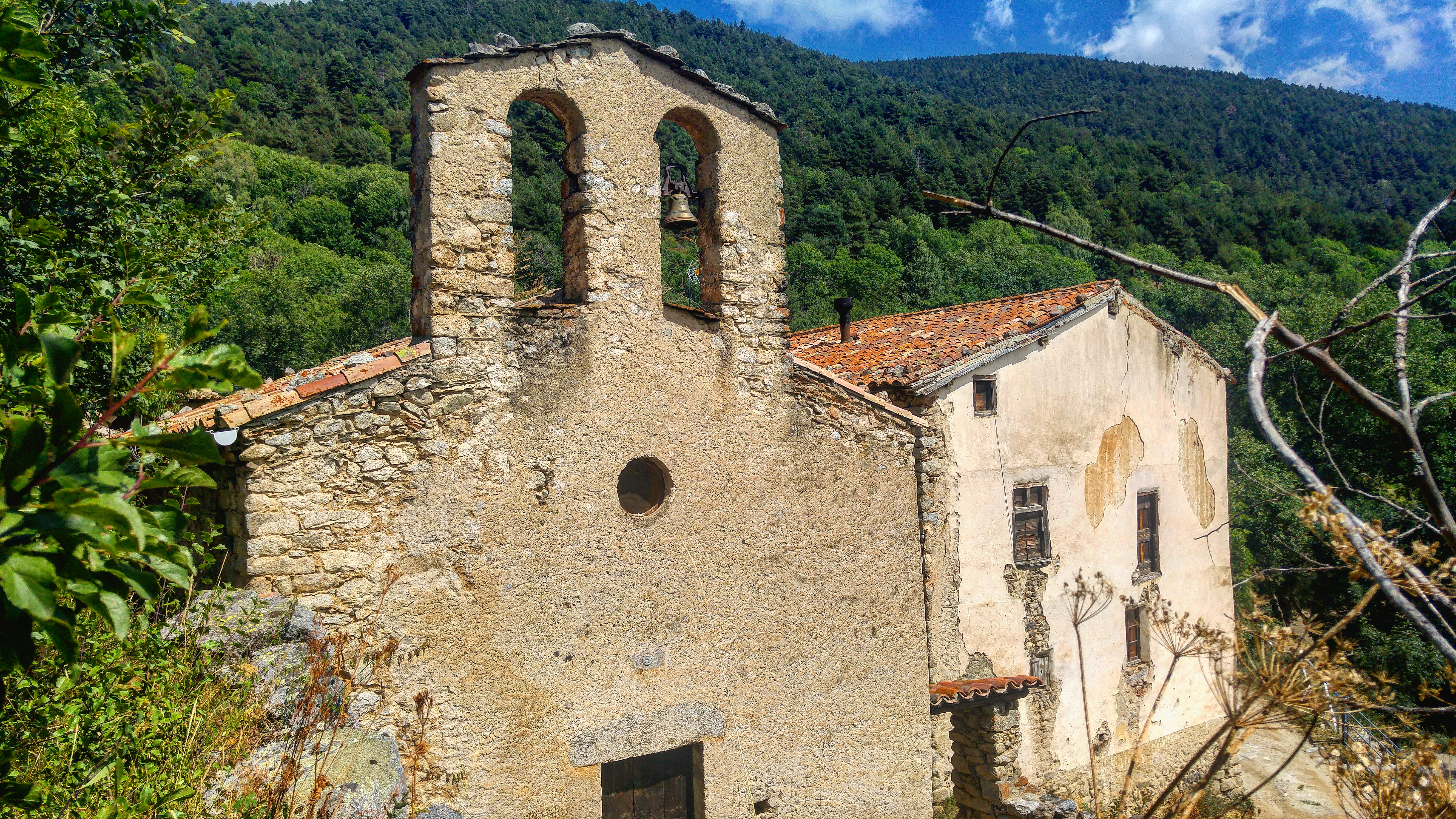 Santa Llúcia de Coborriu de la Llosa, església del petit poble del municipi de Lles de Cerdanya, Baixa Cerdanya